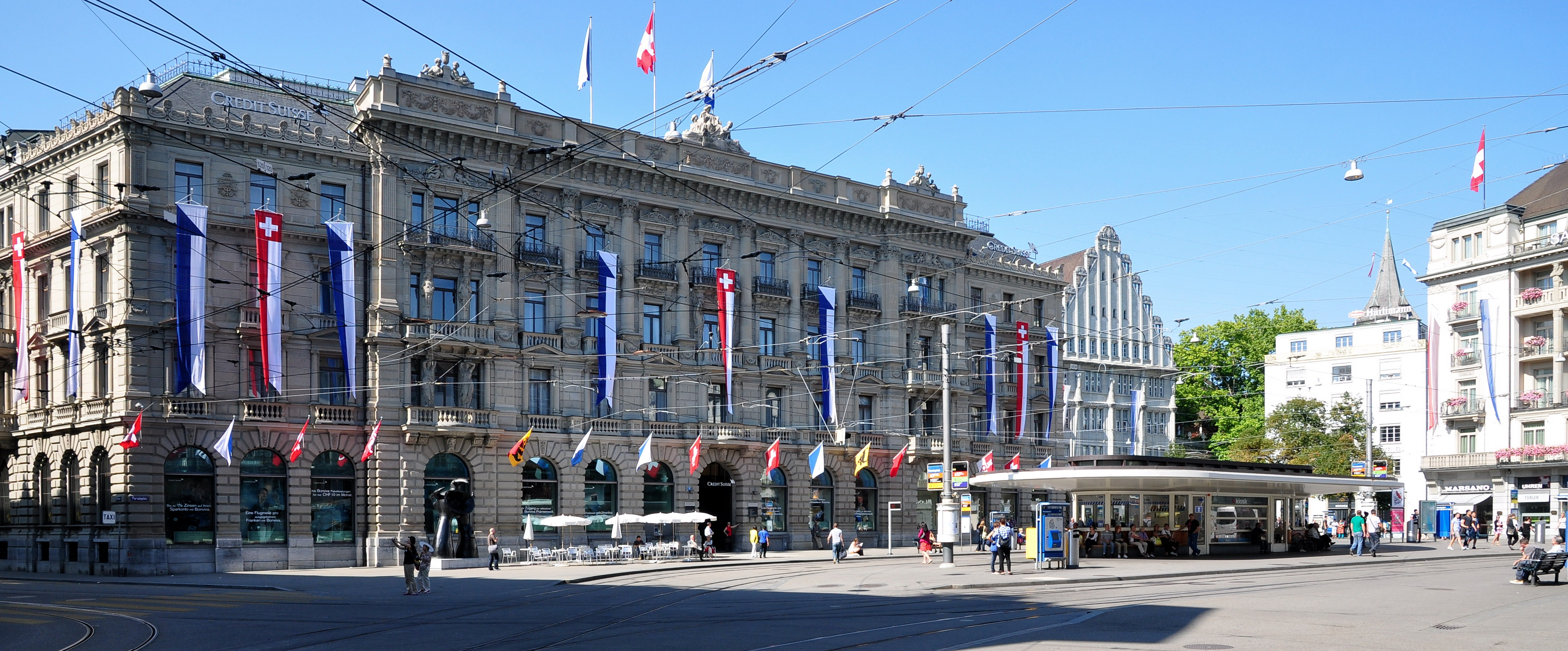 Credit Suisse, Paradeplatz in Zürich (Switzerland)